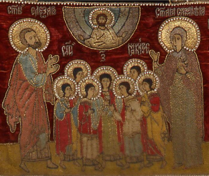 Семь мучеников Маккавеев, их мать святая Соломония и учитель святой Елеазар (фрагмент пелены "Явление Богоматери Сергию и праздники")